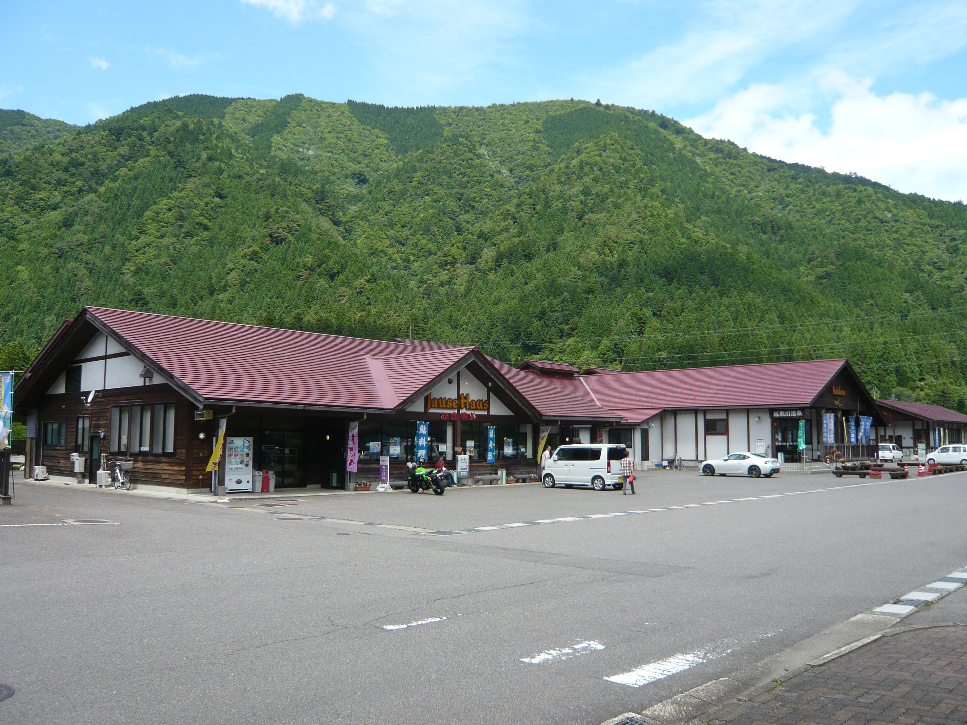 板取川温泉 バーデェハウス